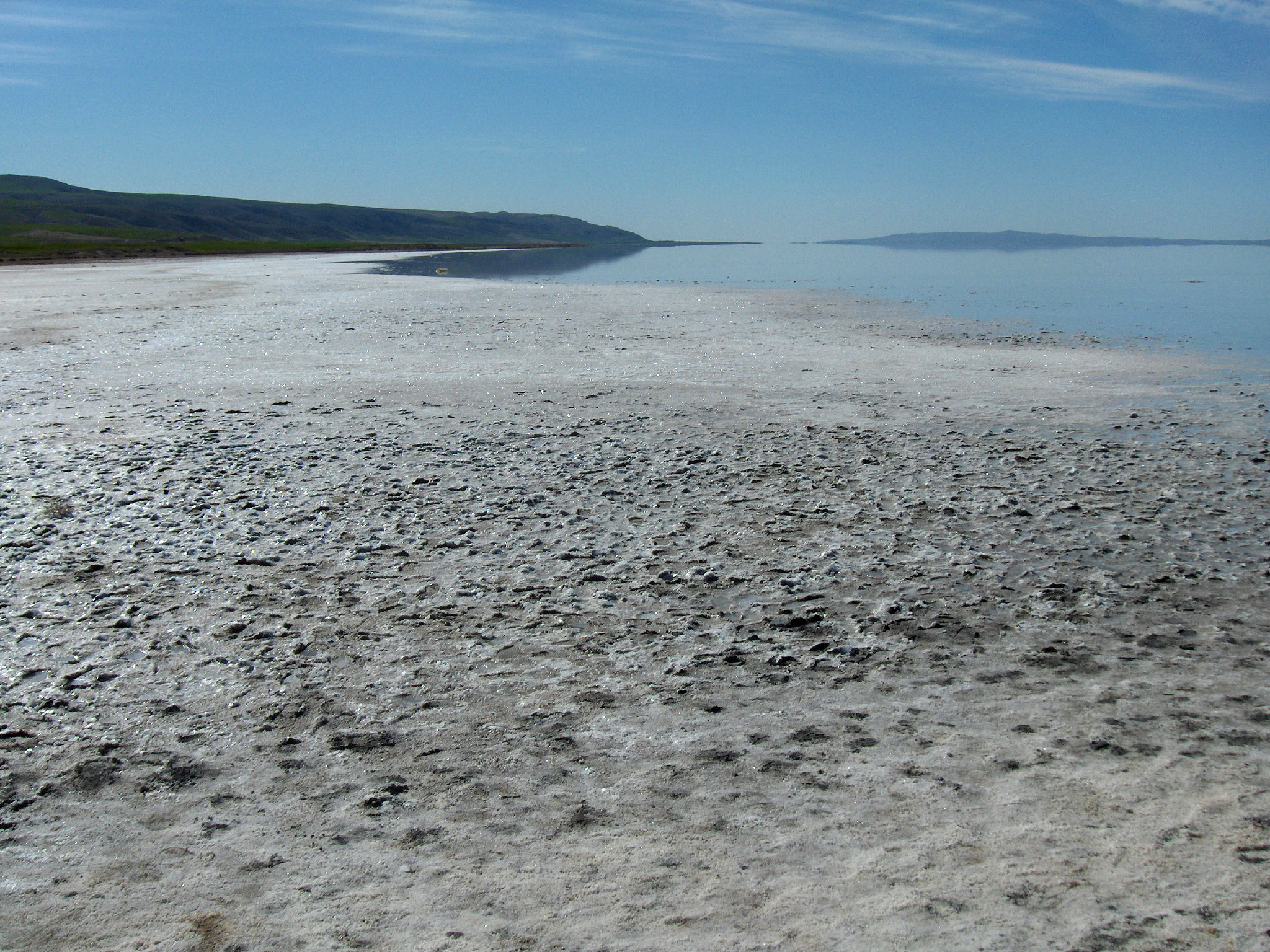 Lake Tuz, very large saline lake in Turkey